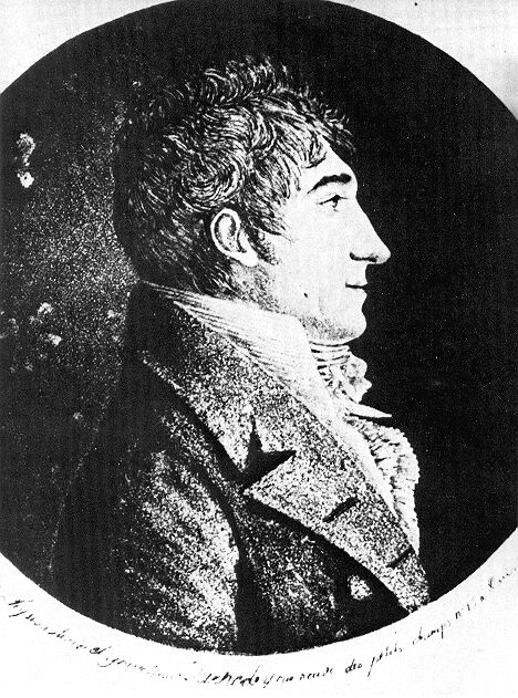 Karl Ludwig Harding 18:39, 29 ago 2005 Dread83 468x631 (102472 bytes) (Karl Ludwig Harding PD )